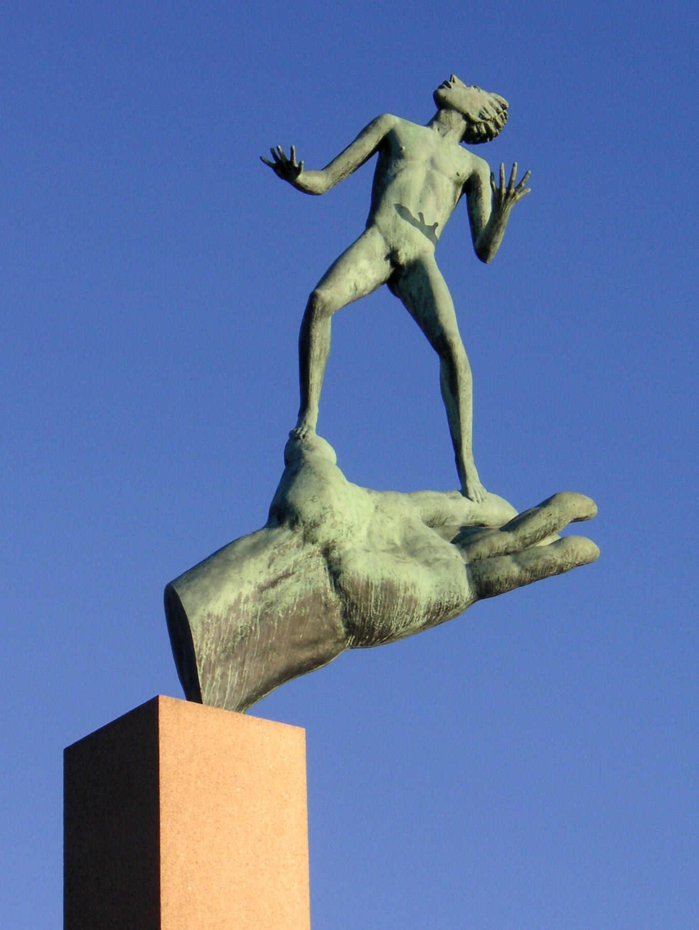 Carl Milles skulptur "Guds hand" i skulpturparken på Millesgården, Lidingö